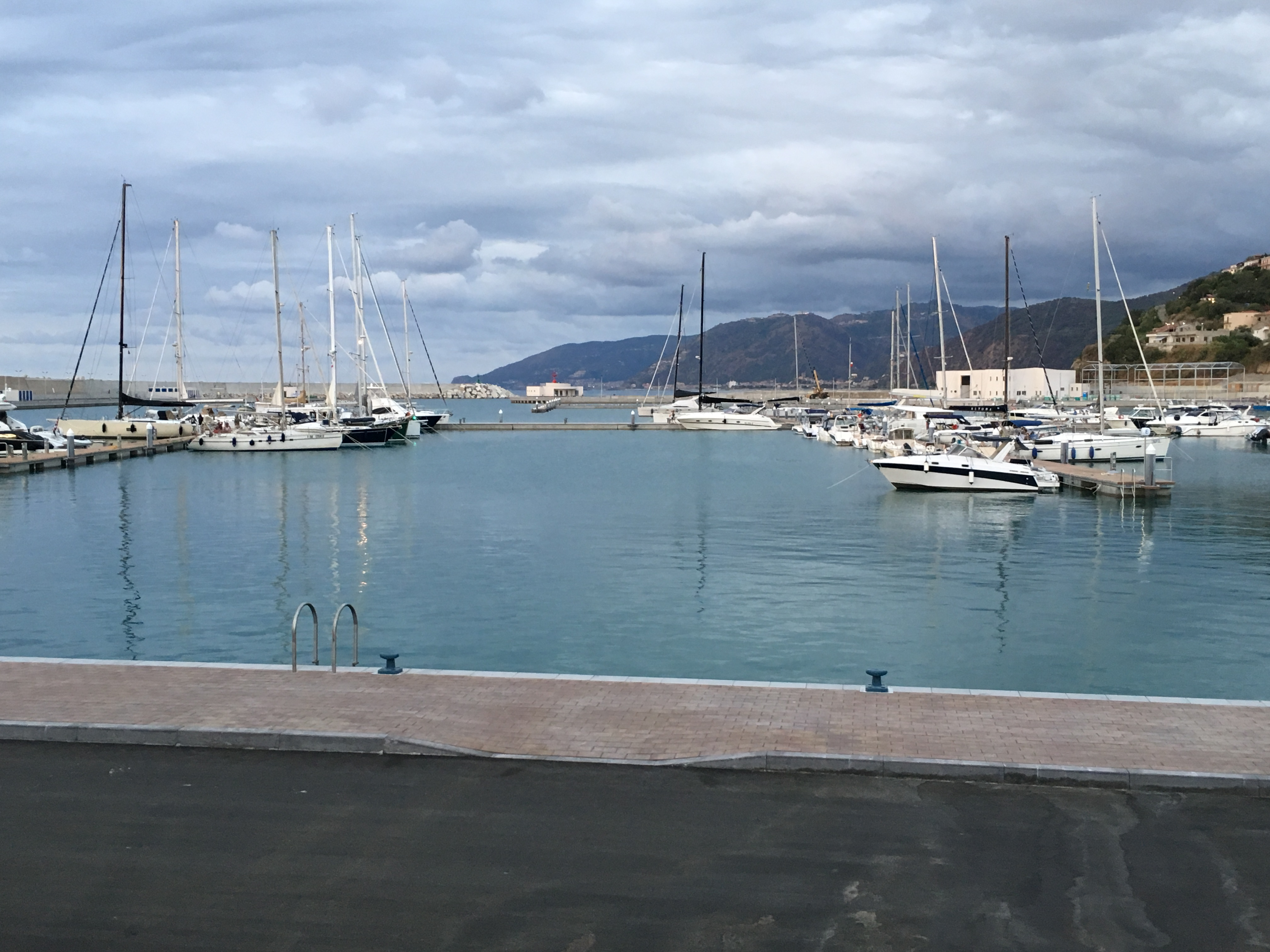 Porto turistico di Capo d’Orlando nella frazione di San Gregorio